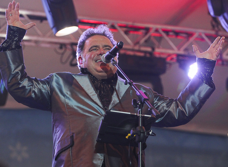 O cantor brasileiro Leo Jaime na Fifa Fan Fest em Taguatinga, DF